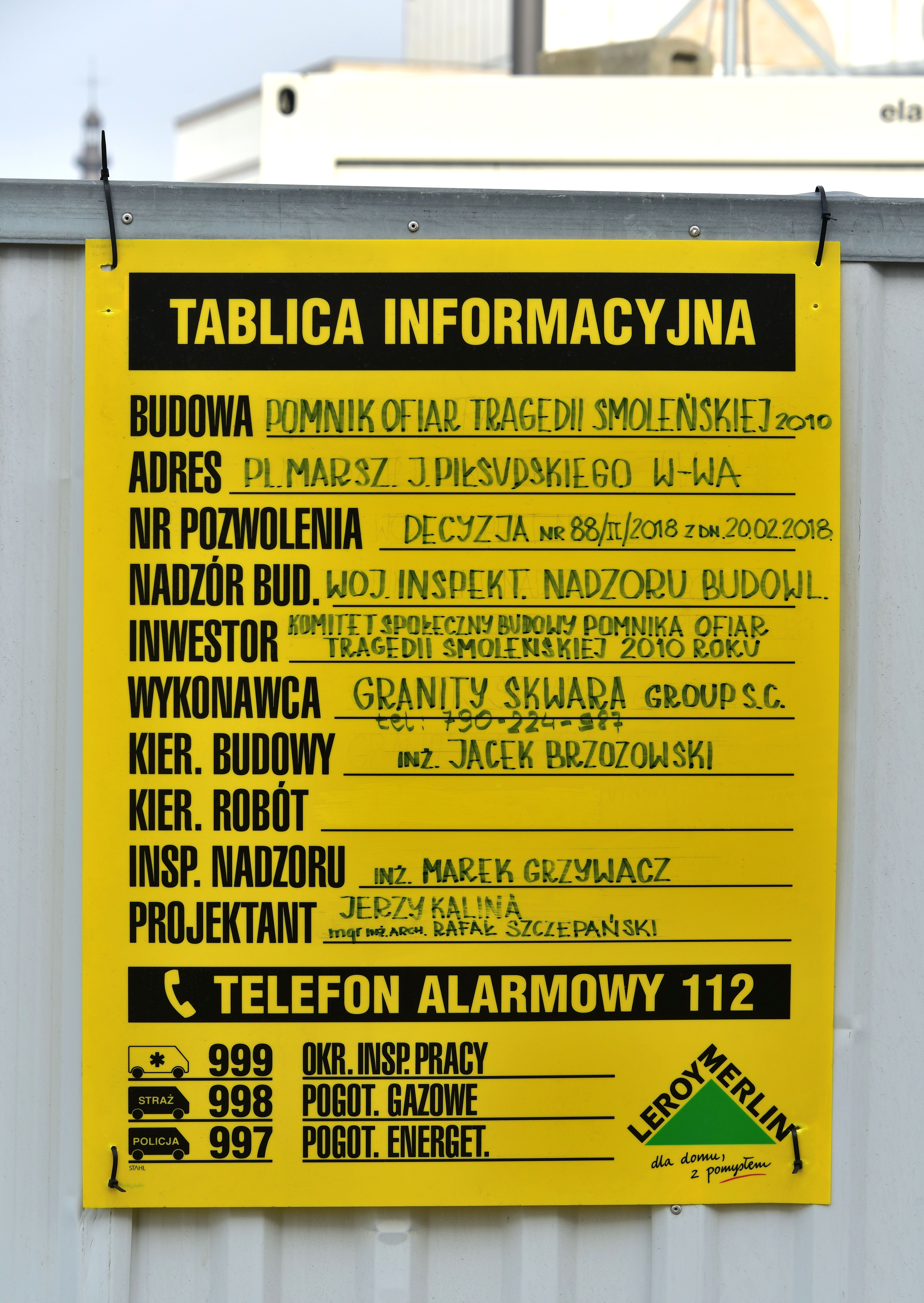 Tablica informacyjna budowy, pomnik Ofiar Tragedii Smoleńskiej na placu Piłsudskiego w Warszawie.